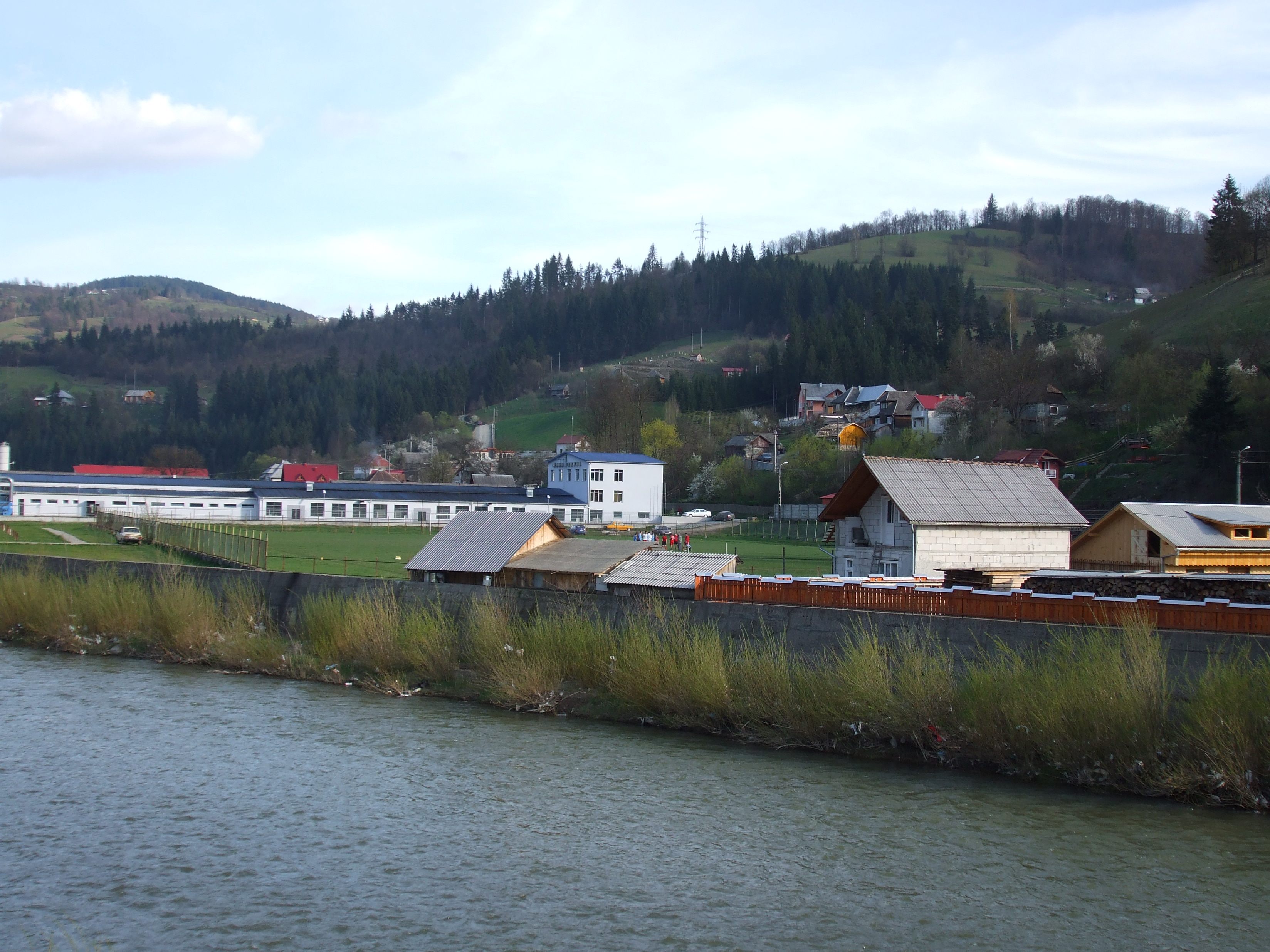 Imagini din Câmpeni, jud.Alba